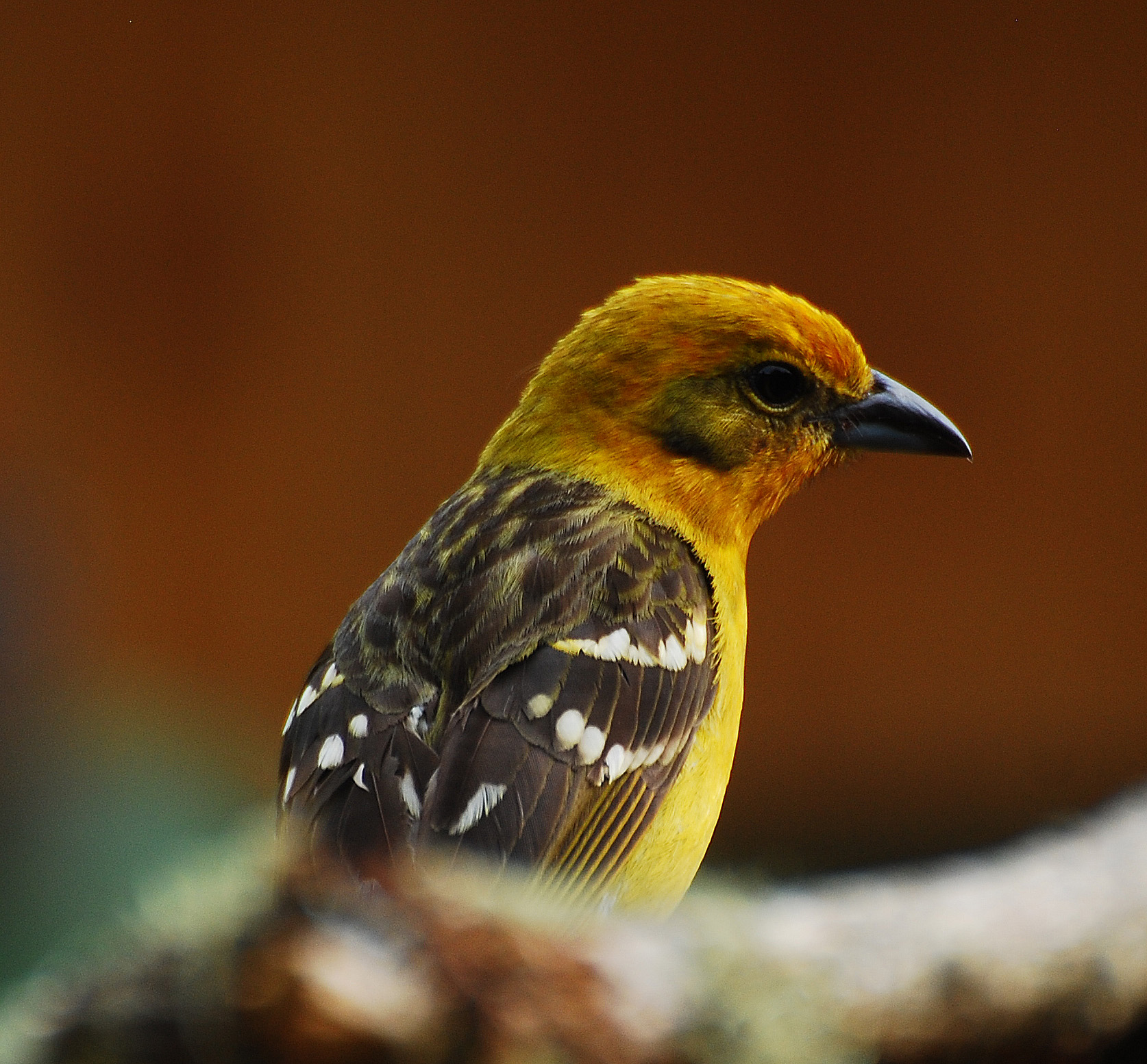 Flame-colored Tanager at Savegre Lodge, Costa Rica, 080226. Piranga bidentata.